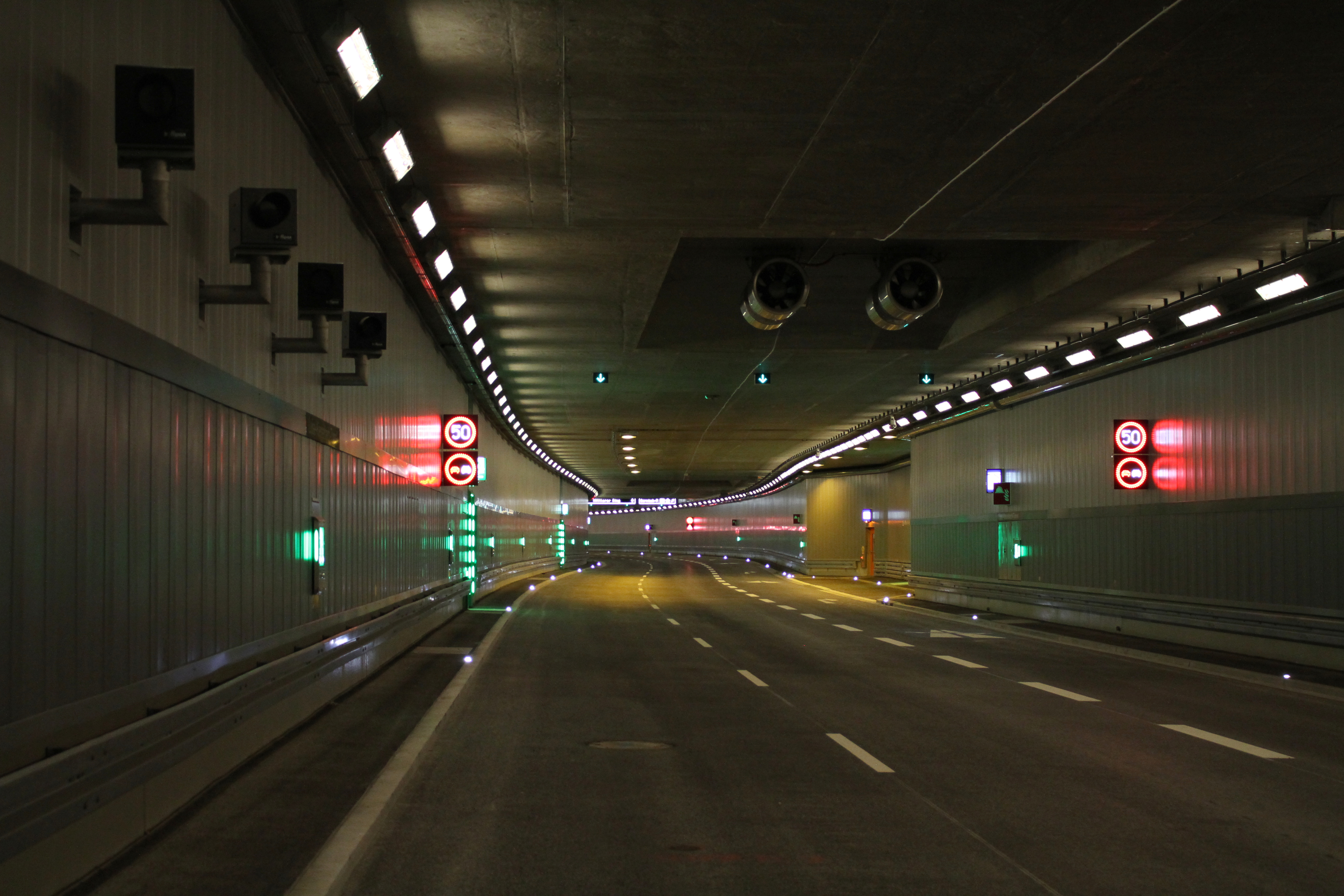 Luise-Kiesselbach-Tunnel des Mittleren Rings mit Ventilatoren und Geschwindigkeitsmessgeräten